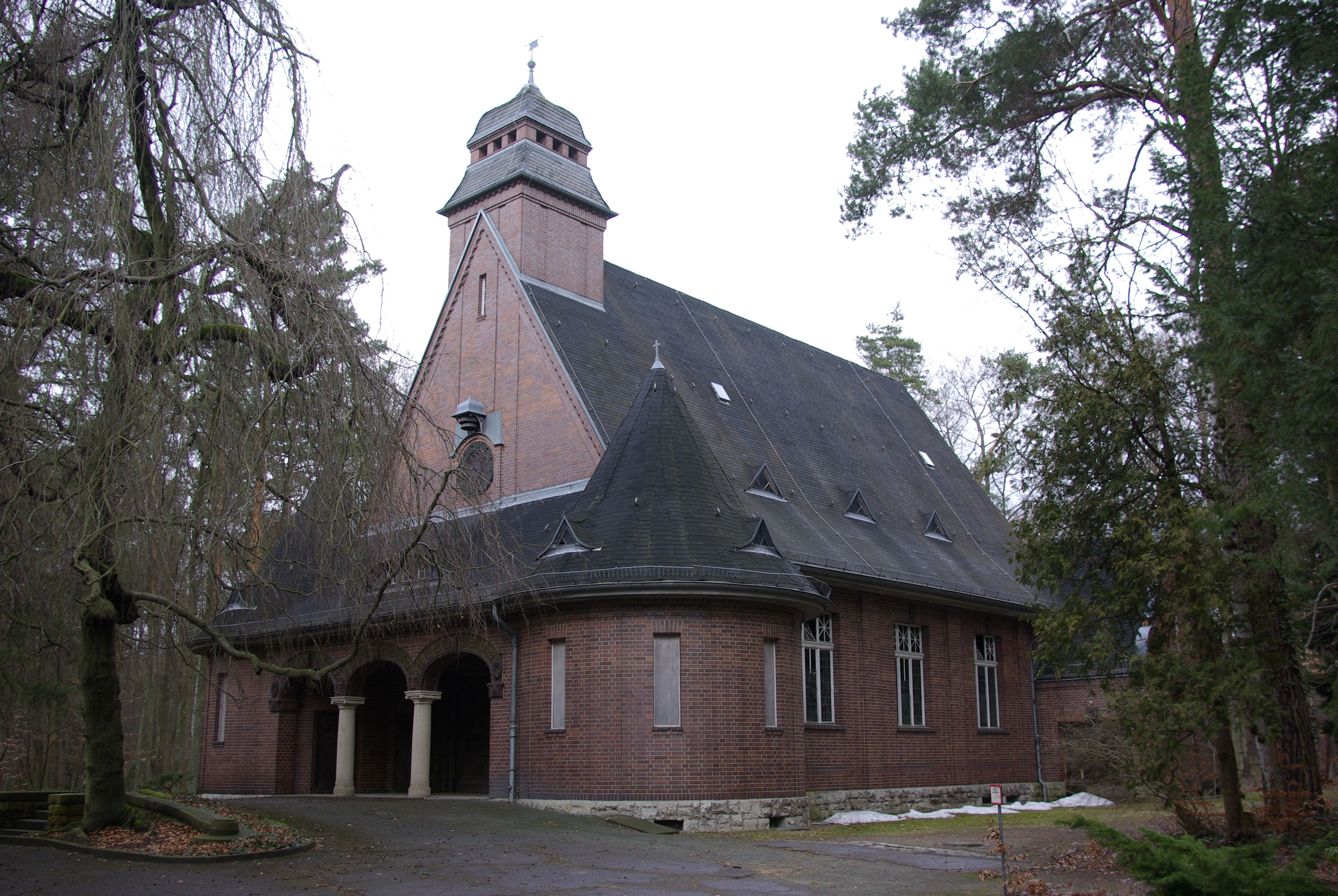 Stahnsdorf in Brandenburg. Die Kapelle auf dem denkmalgeschützten Wilmersdorfer Waldfriedhof Güterfelde.